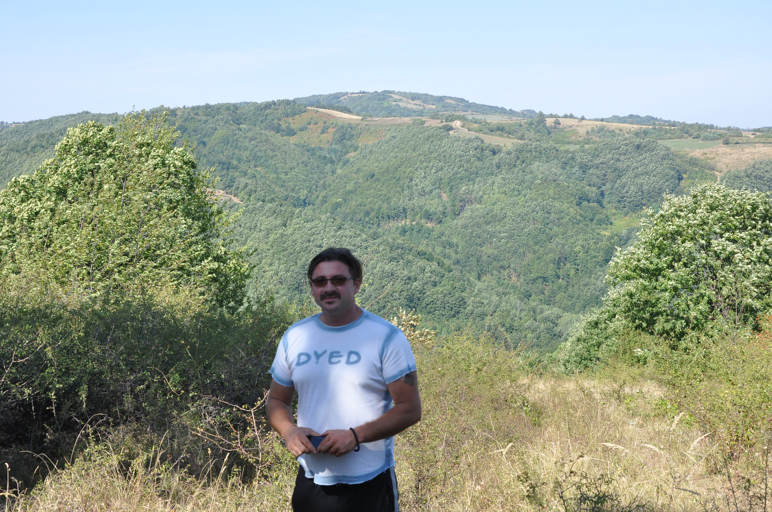 Дејан Миленковић, председник МЗ Дулене